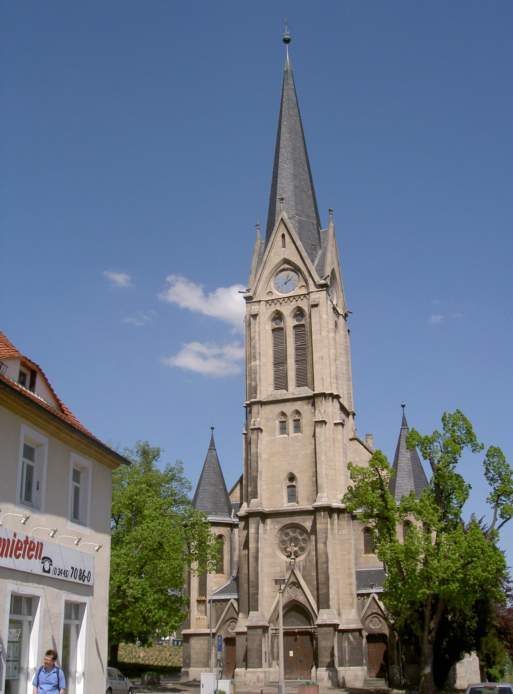 Bad Kösen, Kirche